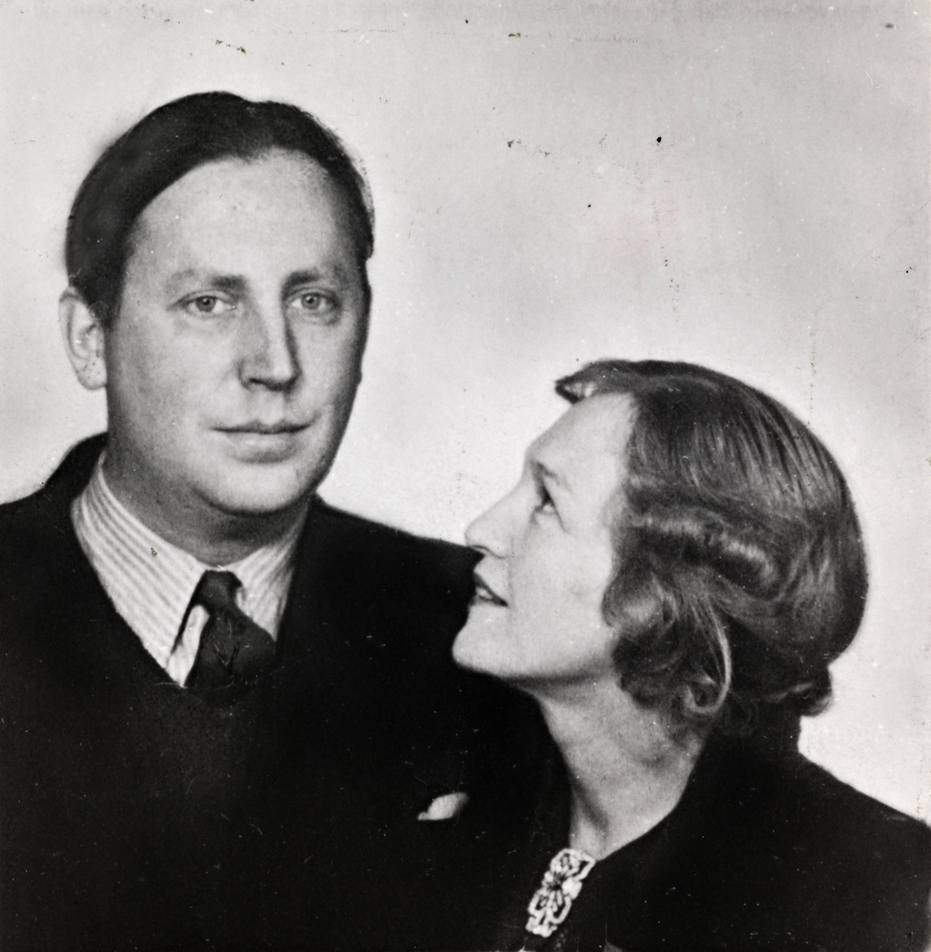 Beskrivelse / Description: Nordahl Grieg var forfatter. Han var også utdannet offiser og deltok som krigskorrespondent i flytokter over Atlanterhavet og Nordsjøen. Han ble drept da flyet han satt i ble skutt ned over Berlin 2. desember 1943. Nordahl Grieg giftet seg med skuespilleren, Gerd Grieg i 1940. (kilde: snl.no). Dato / Date: ukjent / unknown Fotograf / Photographer: ukjent / unknown Digital kopi av original / Digital copy of original: s/h papirpositiv Eier / Owner Institution: Nasjonalbiblioteket / National Library of Norway Lenke / Link: Bildesignatur / Image Number: blds_05983